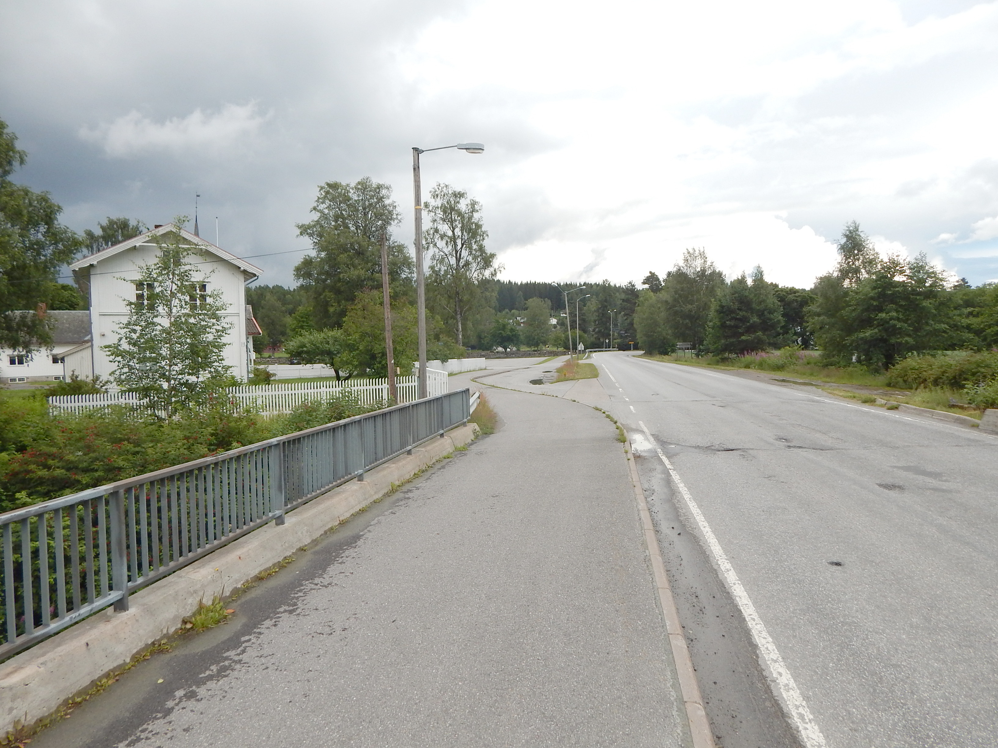 Matrandvegen (fylkesvei 1988, tidl. 343) på Matrand, ved siden av Eidskog kirke